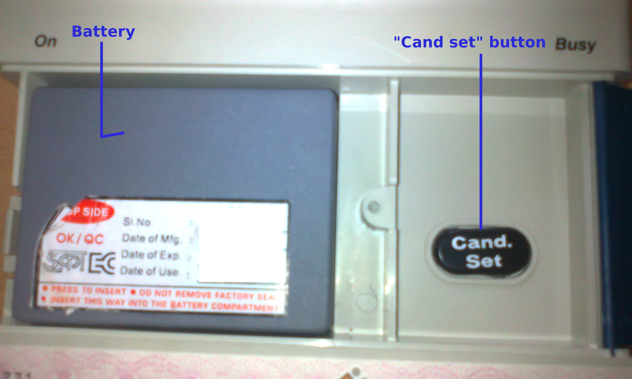 വോട്ടിംഗ് യന്ത്രത്തിന്റെ ബാറ്ററി യൂണിറ്റ് ആണ് ചിത്രത്തിൽ